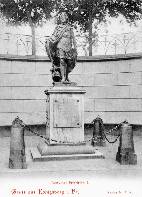 Königsberg